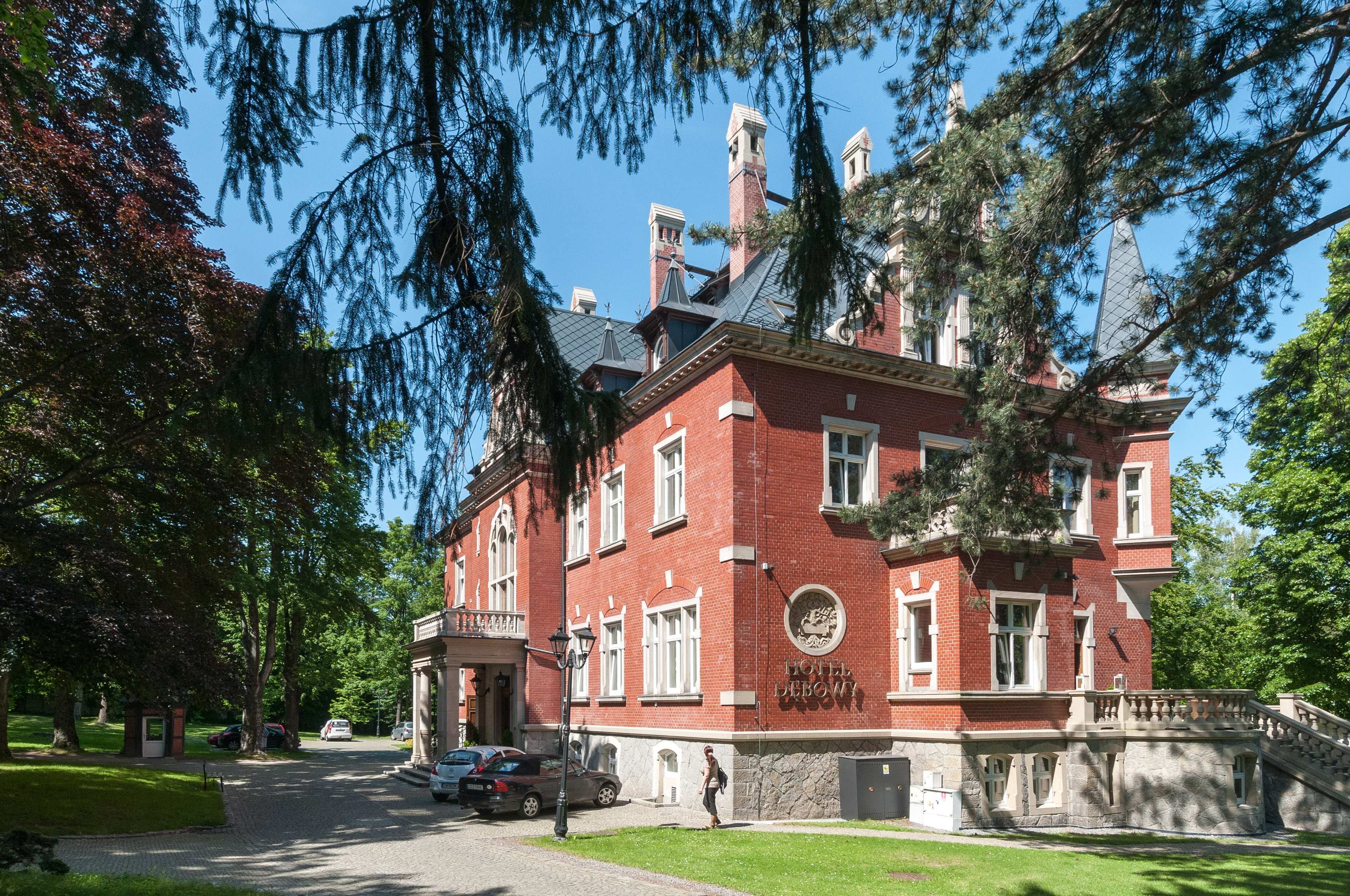 Hotel Dębowy w Bielawie, ul. Janusza Korczaka 4.